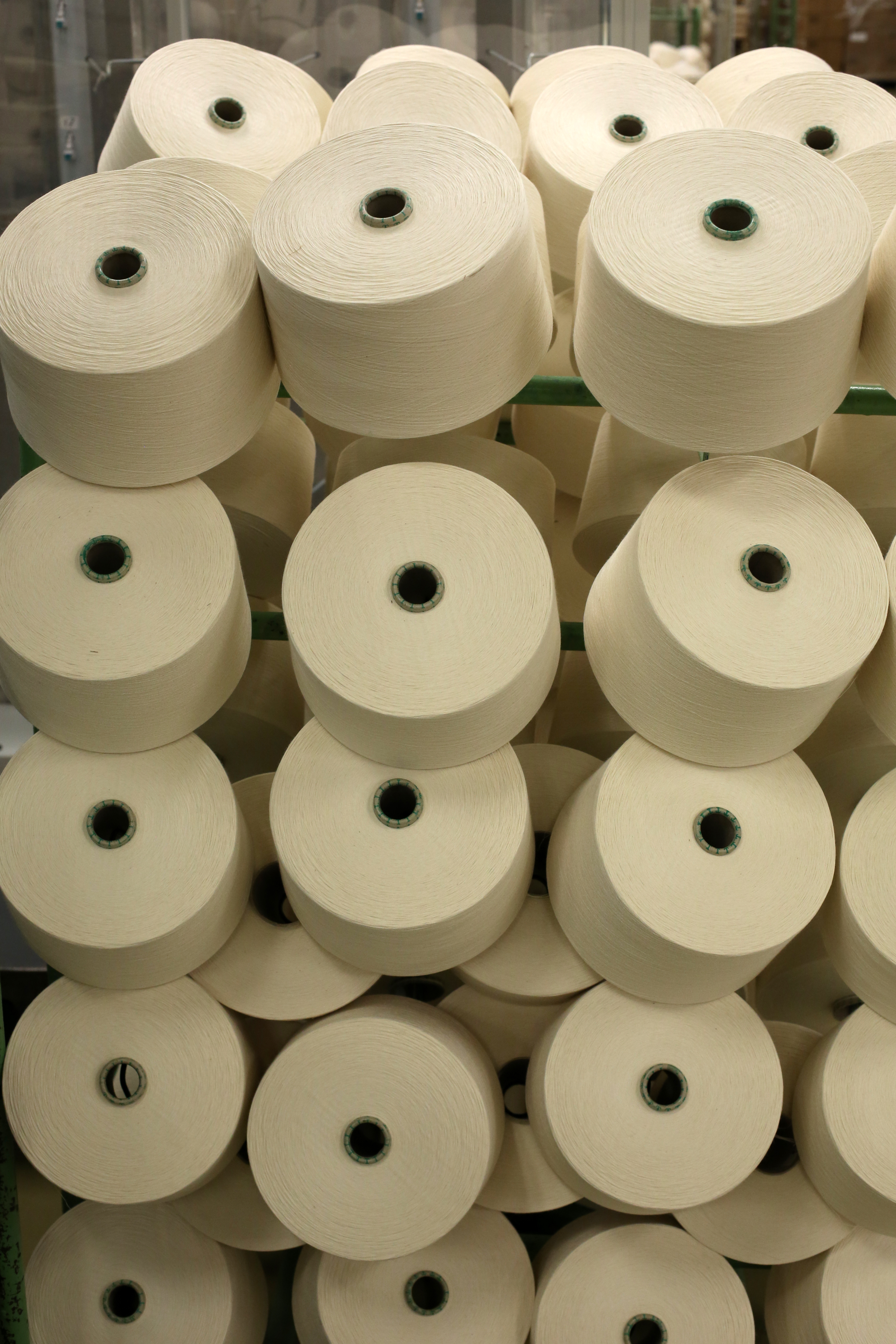 Pleas_prize